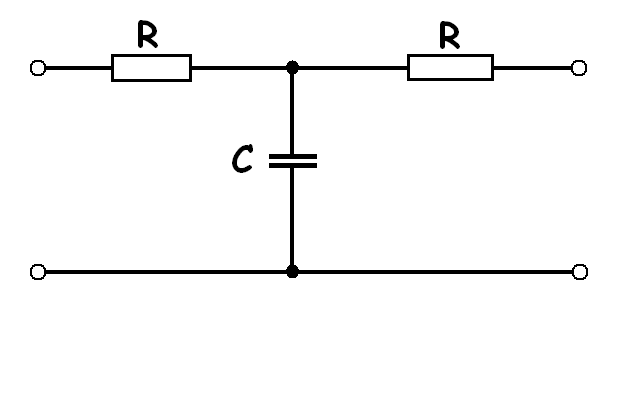 T zapojení dvojbrannu